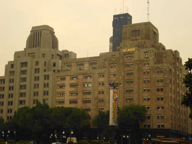 Edificios La Naciona I y II.